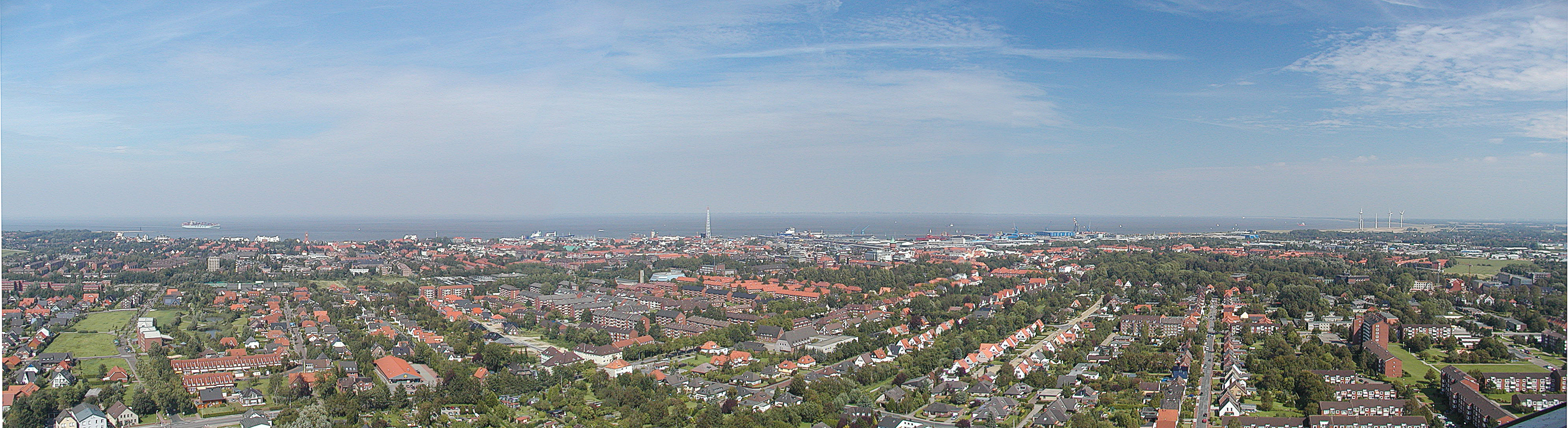 Cuxhaven Panorama groß